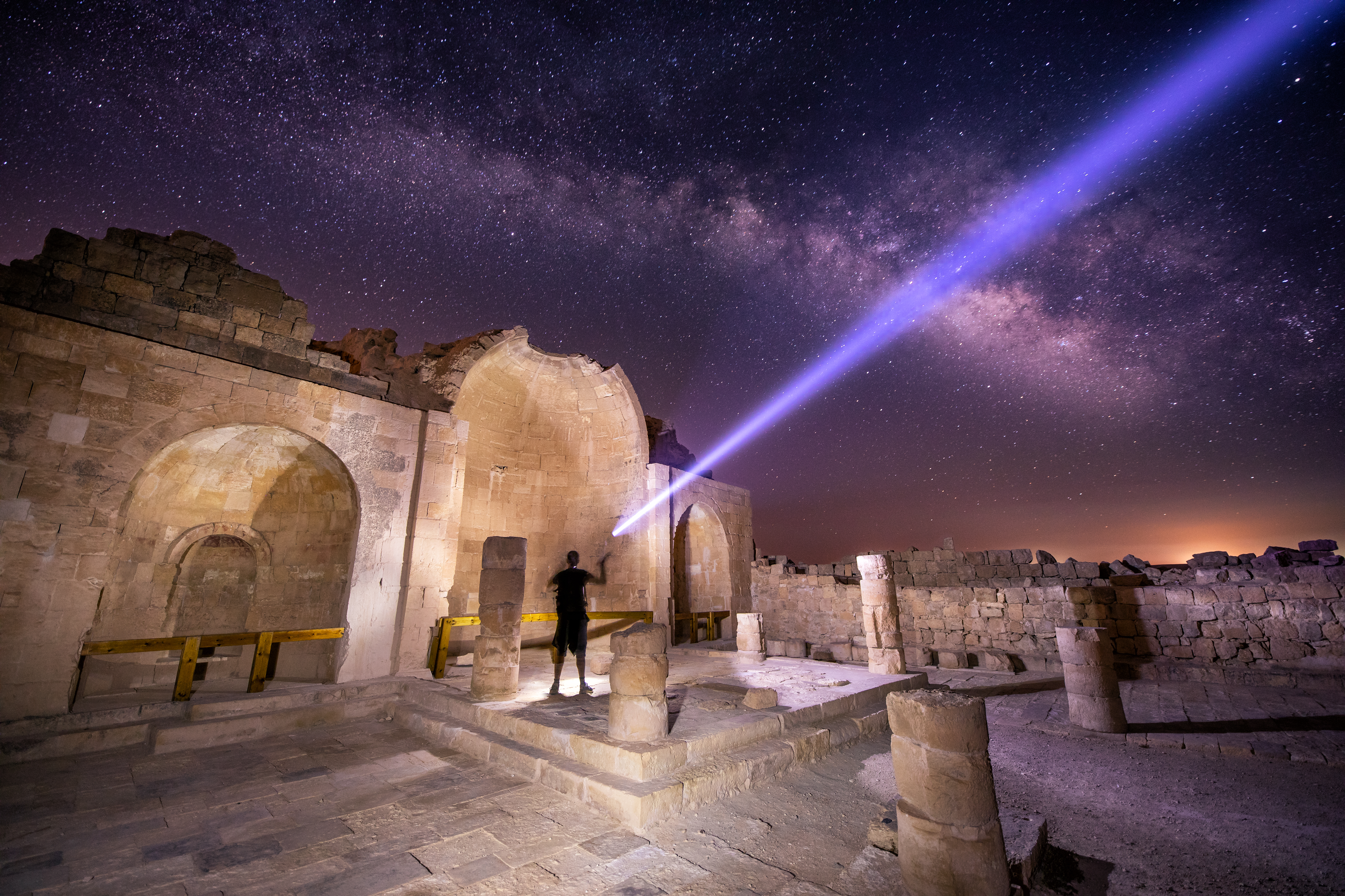 שבטה היא אתר ארכאולוגי השוכן בין ניצנה לשדה בוקר שבנגב. שבטה הייתה מיושבת בין המאה ה-1 למאה ה-9, עת שכנה על דרך הבשמים העתיקה ולאחר מכן הייתה יישוב חקלאי. האתר הוא גן לאומי. בשנת 2005 הוכרזה שבטה כאתר מורשת עולמית על ידי אונסק"ו ביחד עם חלוצה, עבדת וממשית, כחלק מדרך הבשמים.